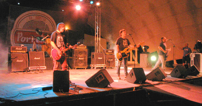 Concierto de Porretas en Hortaleza el 7 de julio de 2005